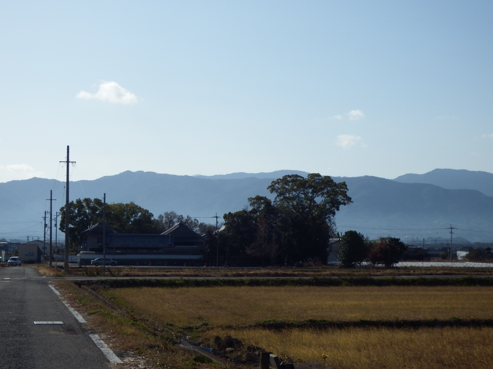 法輪寺の遠景